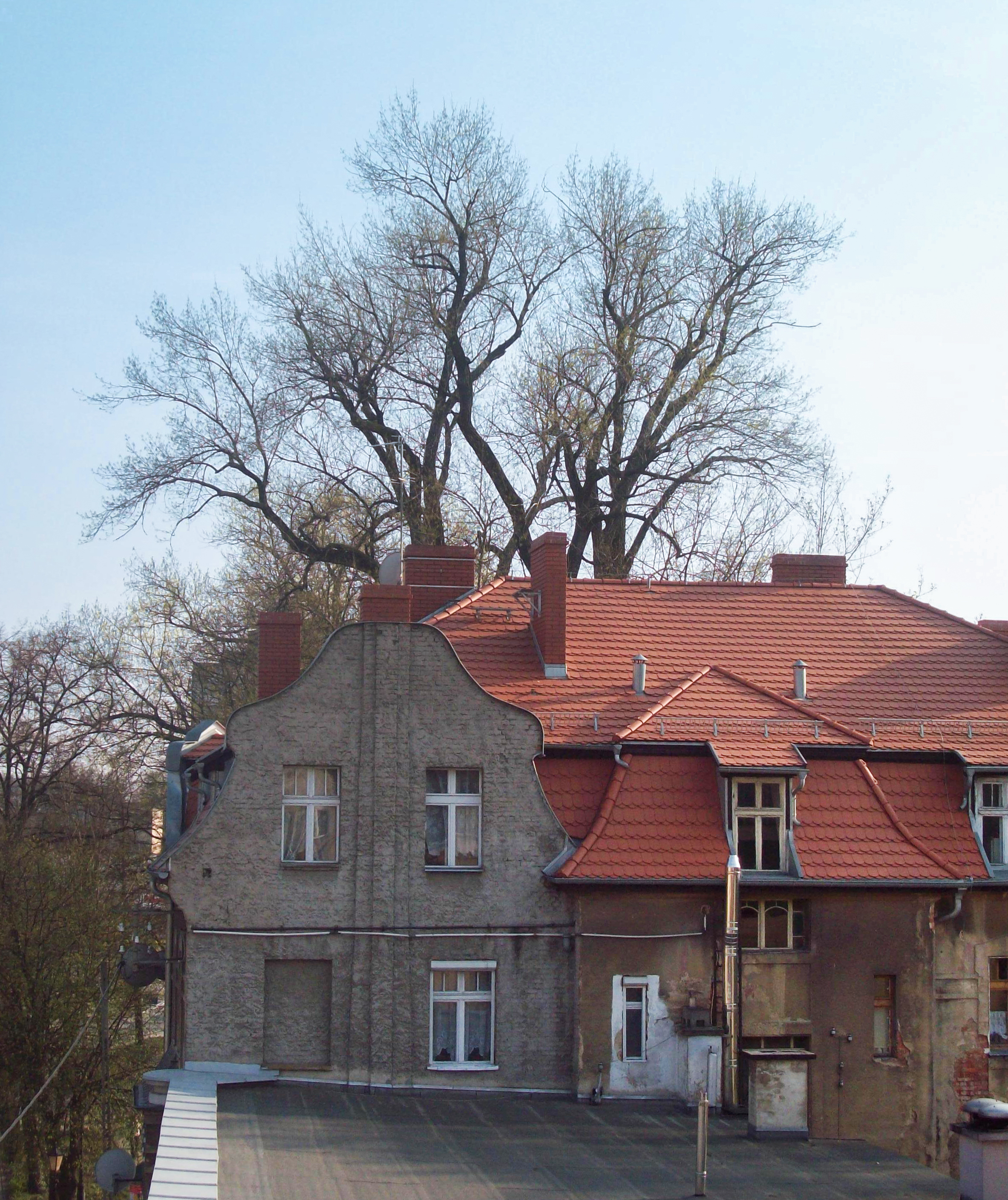 Topola czarna w Kłodzku przy ul. Daszyńskiego, jedno z najstarszych drzew w mieście, pomnik przyrody